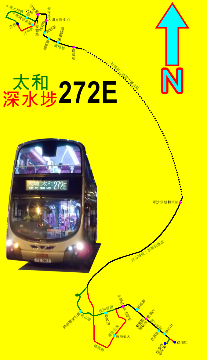 九巴272E線的走線圖